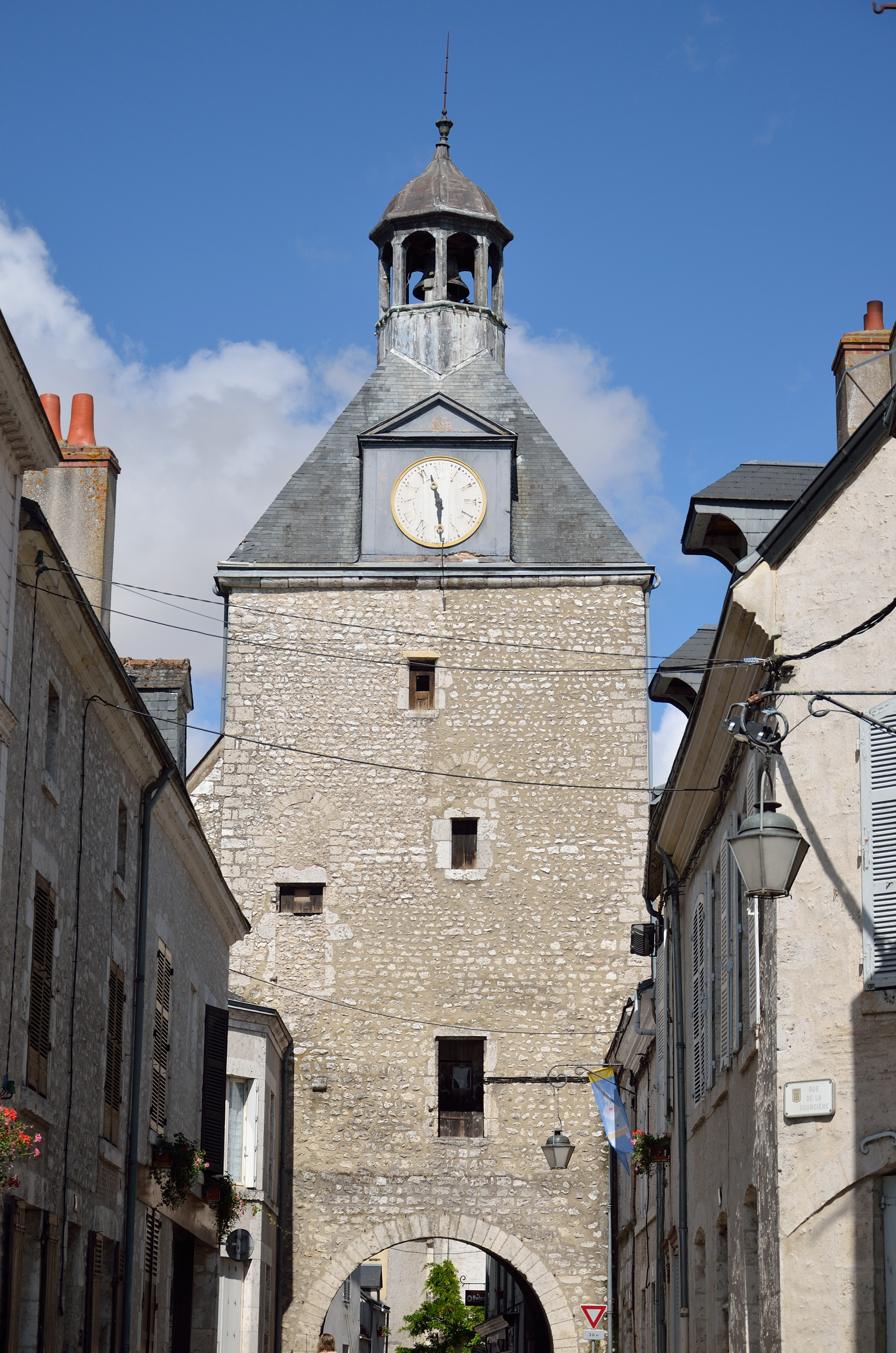 Beaugency : la porte de la Tour de l'horloge